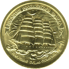 Монета Банка России — Серия: «Флот», Набор памятных монет: 300-летие Российского флота, 5 рублей, реверс